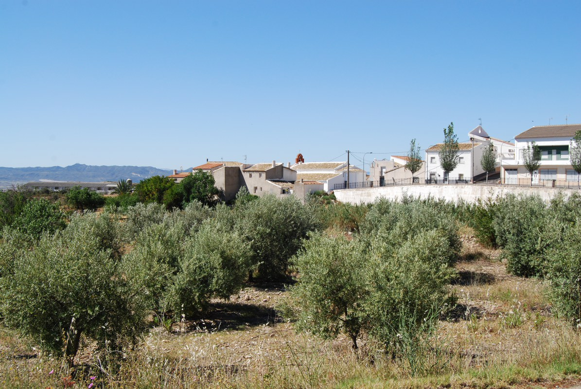 Vista del pueblo de Goñár que está en parte dentro de la pedanía de Puerto Adentro (Puerto Lumbreras)